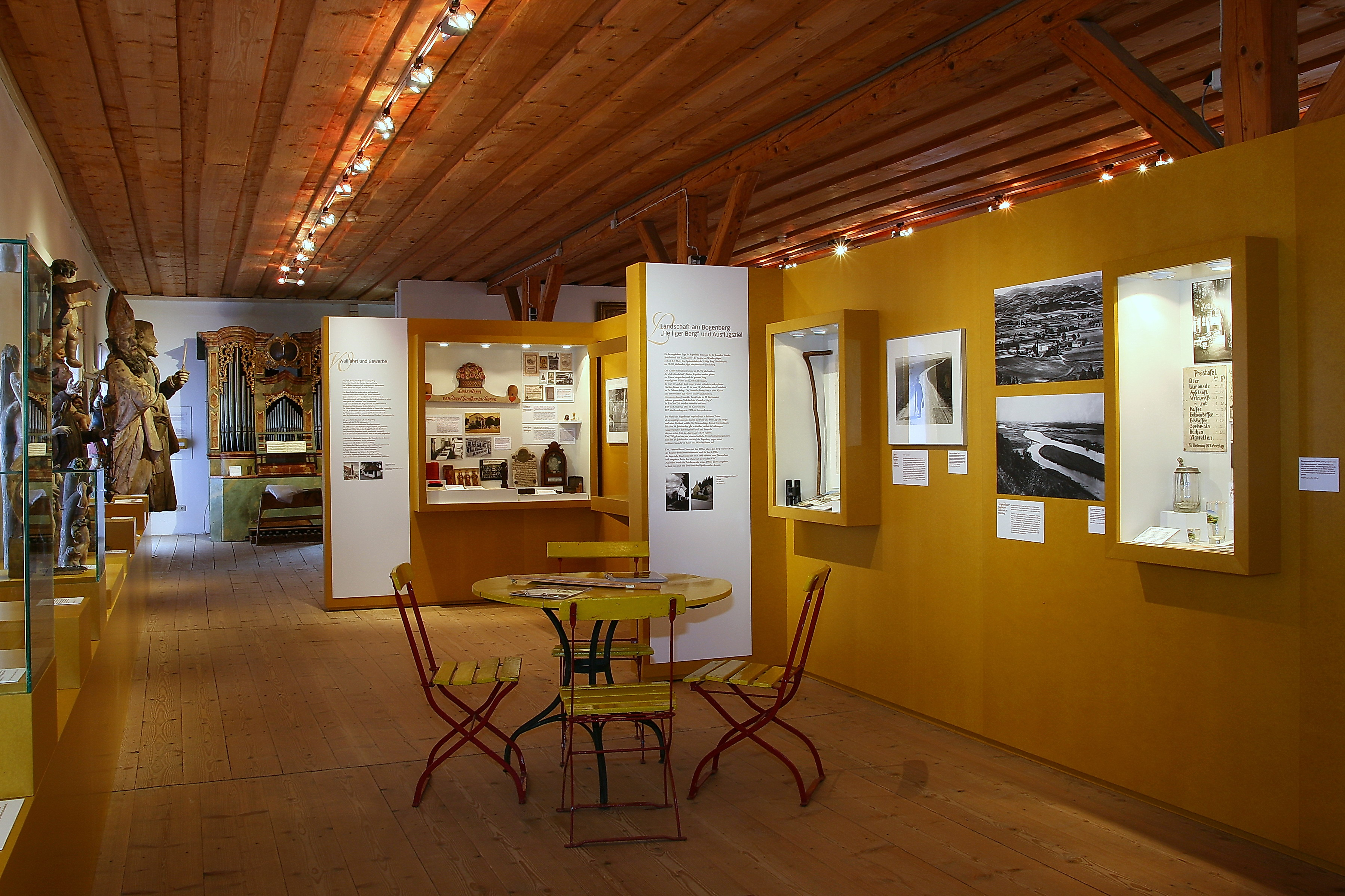 Kreismuseum Bogenberg. Der Bogenberg als Wallfahrts- und als Ausflugsziel. Daurerausstellung im Obergeschoss des Museums.